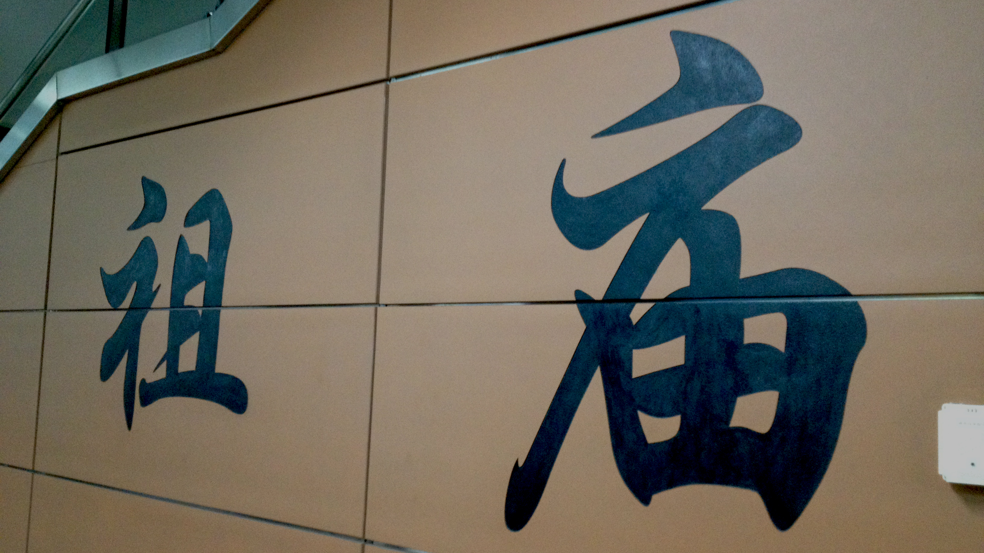 广佛地铁祖庙站月台书法站名